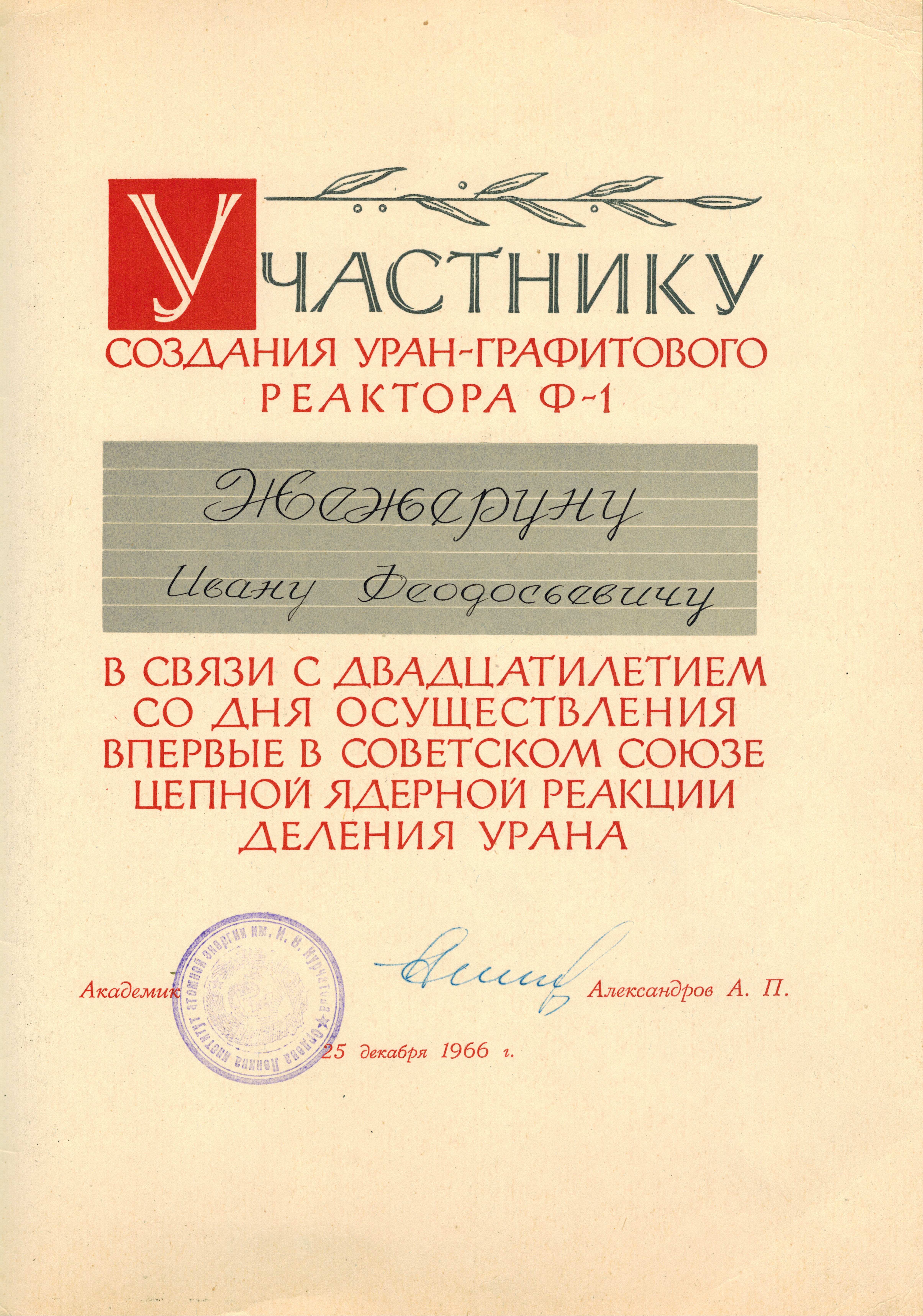 Грамота участнику пуска первого реактора Ф-1